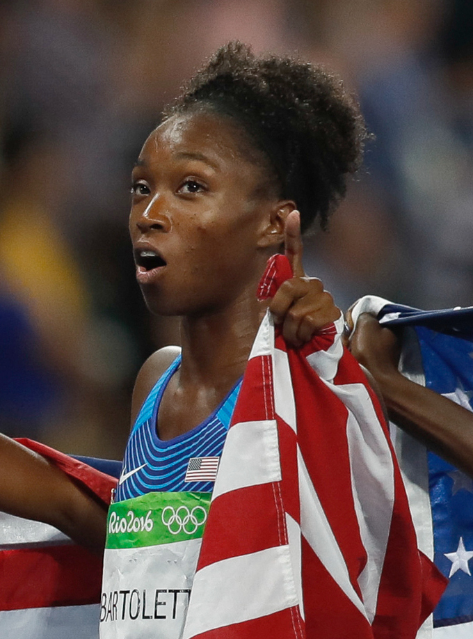 Rio de Janeiro - Corredoras dos Estados Unidos Tianna Bartoletta, Allyson Felix, English Gardner e Tori Bowie vencem final do revezamento 4 x 100m nos Jogos Rio 2016, no Estádio Olímpico (Fernando Frazão/Agência Brasil)